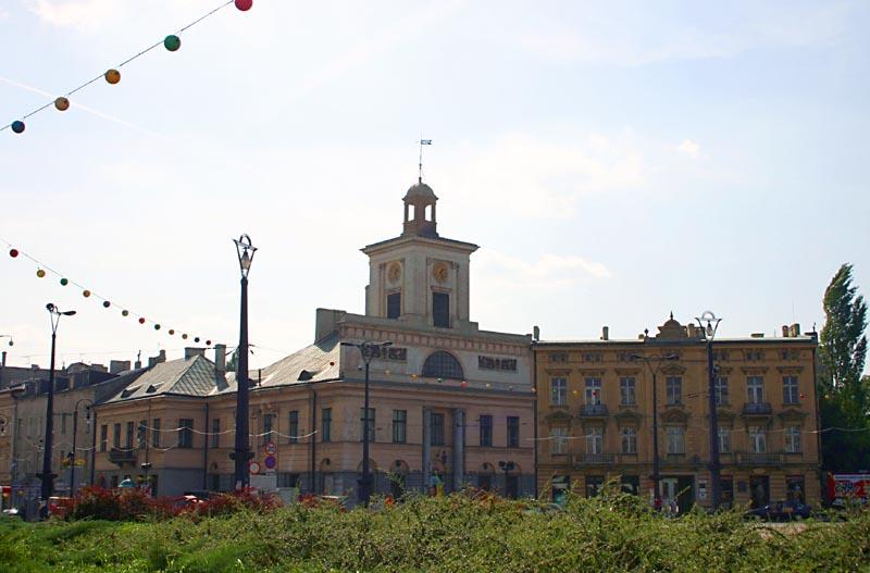 Piotrkowska Street, Lodz, Poland